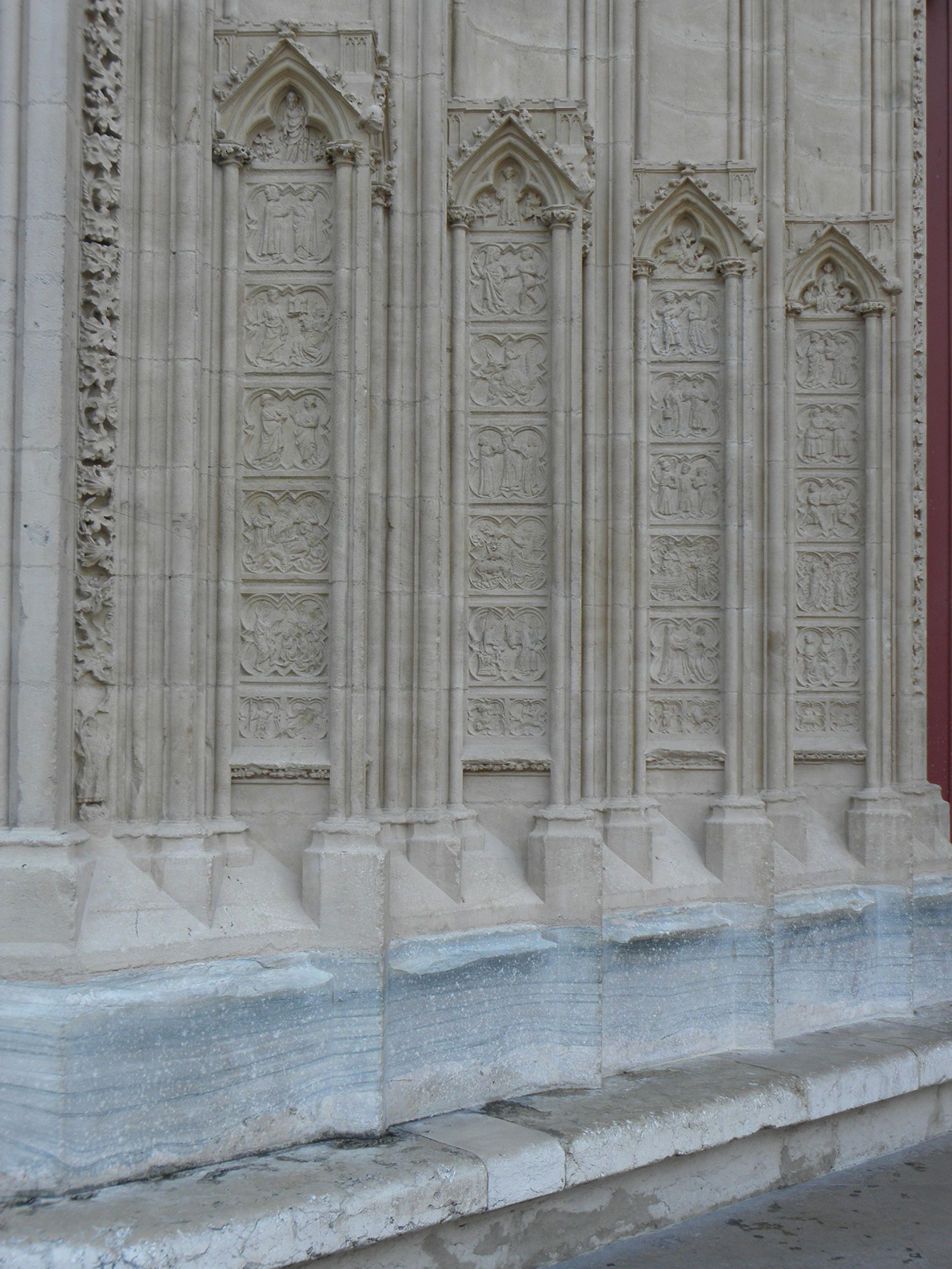 Médaillons ornant l'extérieur des piédroits gauche du portail central de la façade ouest de la Primatiale Saint-Jean-Baptiste de Lyon (69). .